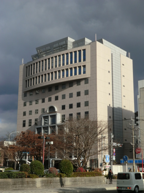 北九州市の男女共同参画センタームーブです。